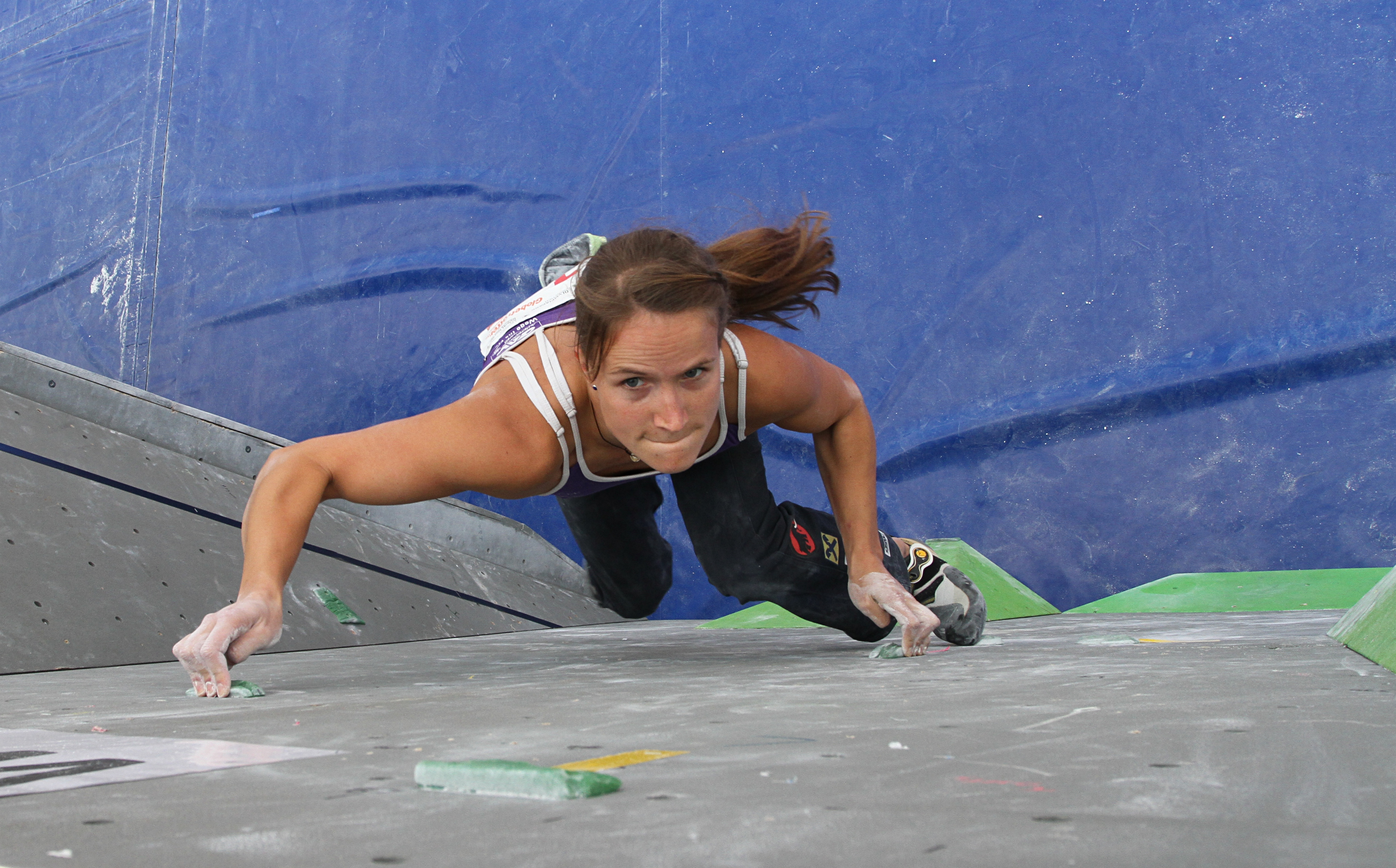 Anna Stoehr, AUS